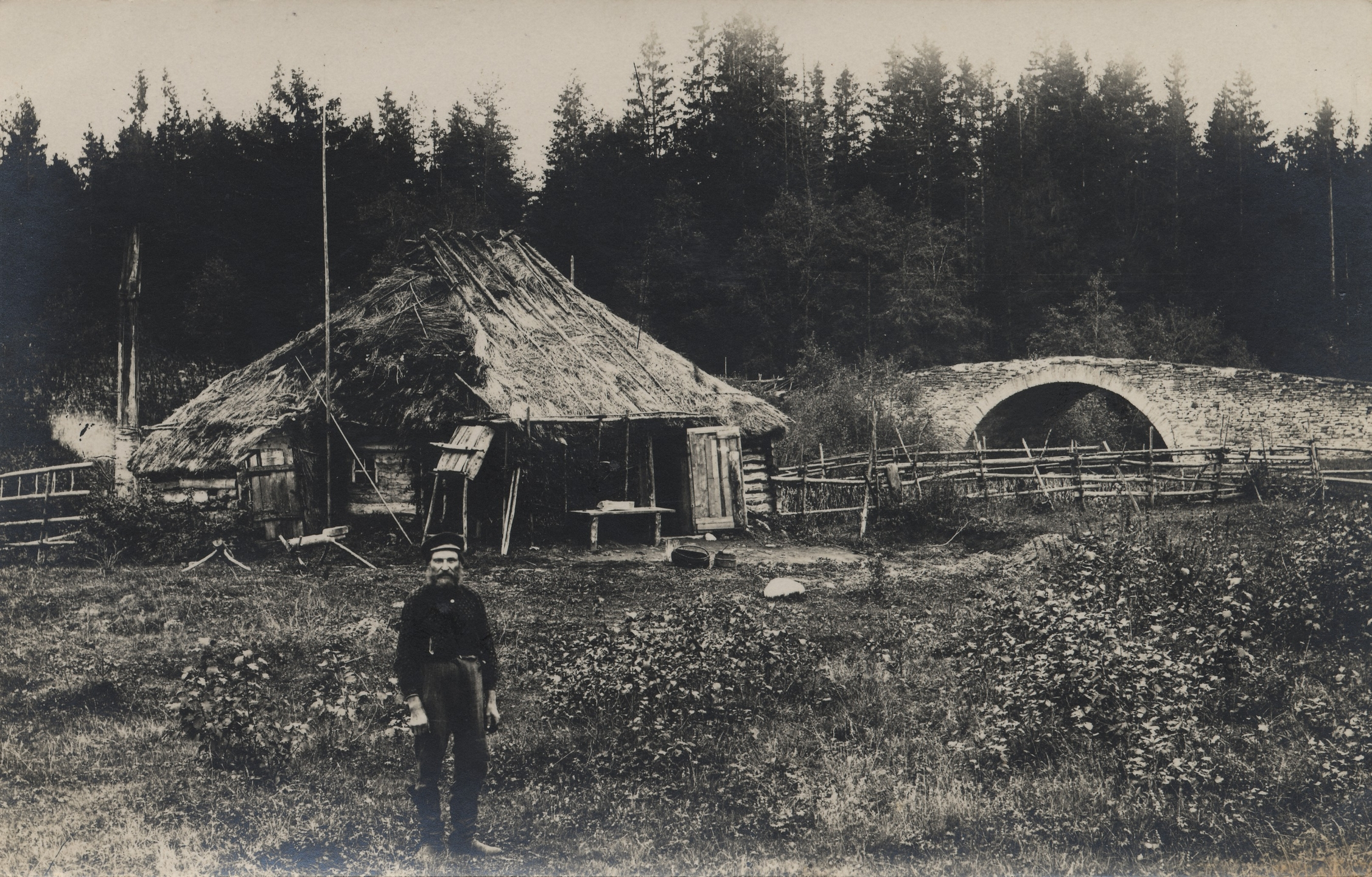 Suitsutare Pühajõe ääres (Toila)